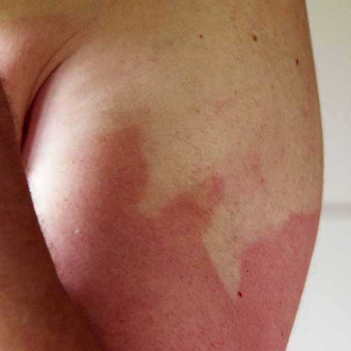 Sonnenbrand am Oberarm nach unvollständigem Schutz durch Sonnencreme.